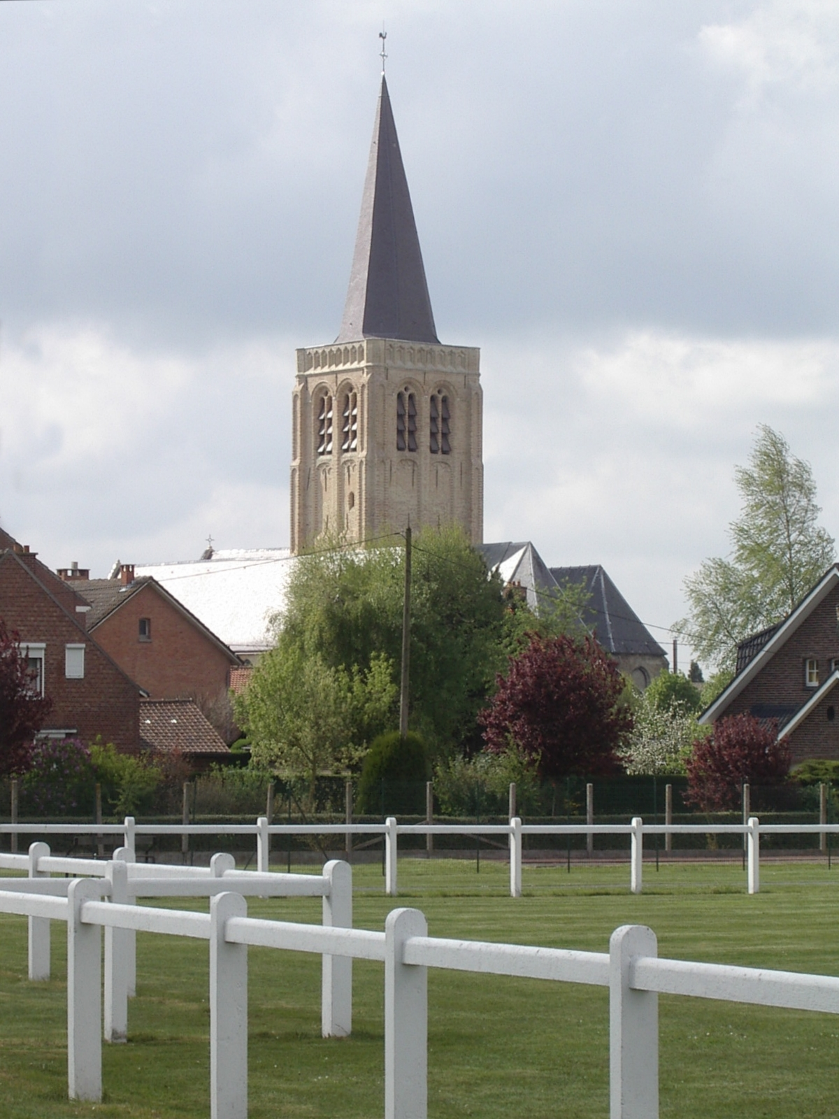 Vue de Killem (France, Nord)